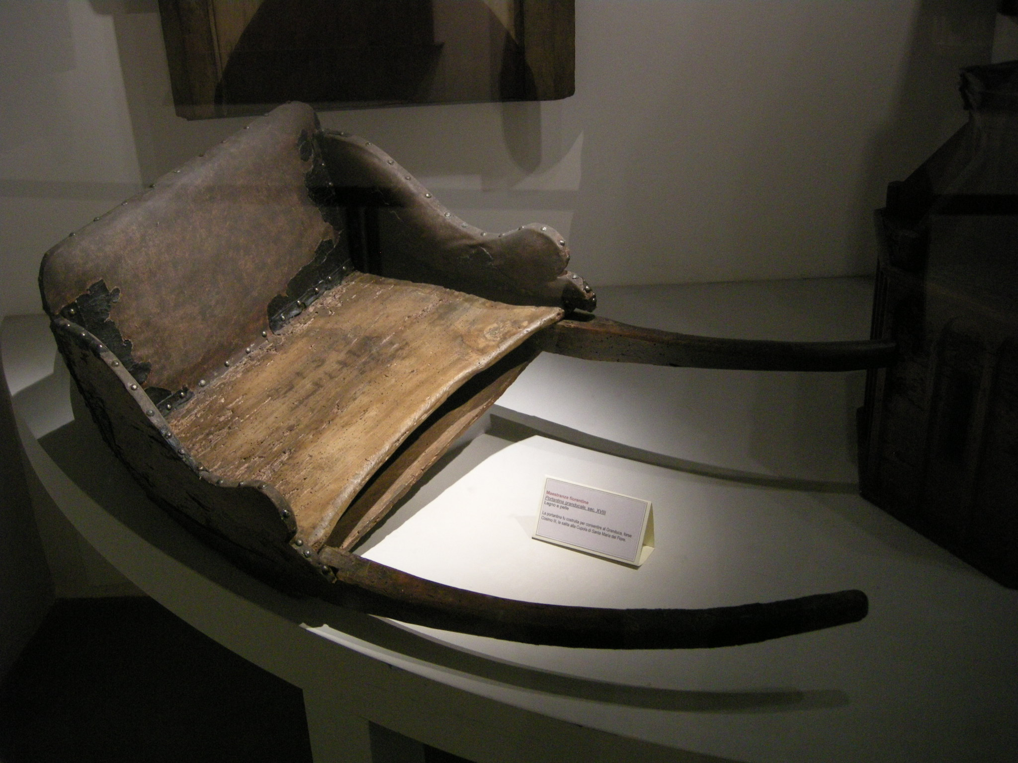 Portantina granducale, xviii secolo, per portare cosimo III in cima alla cupola di santa maria del fiore